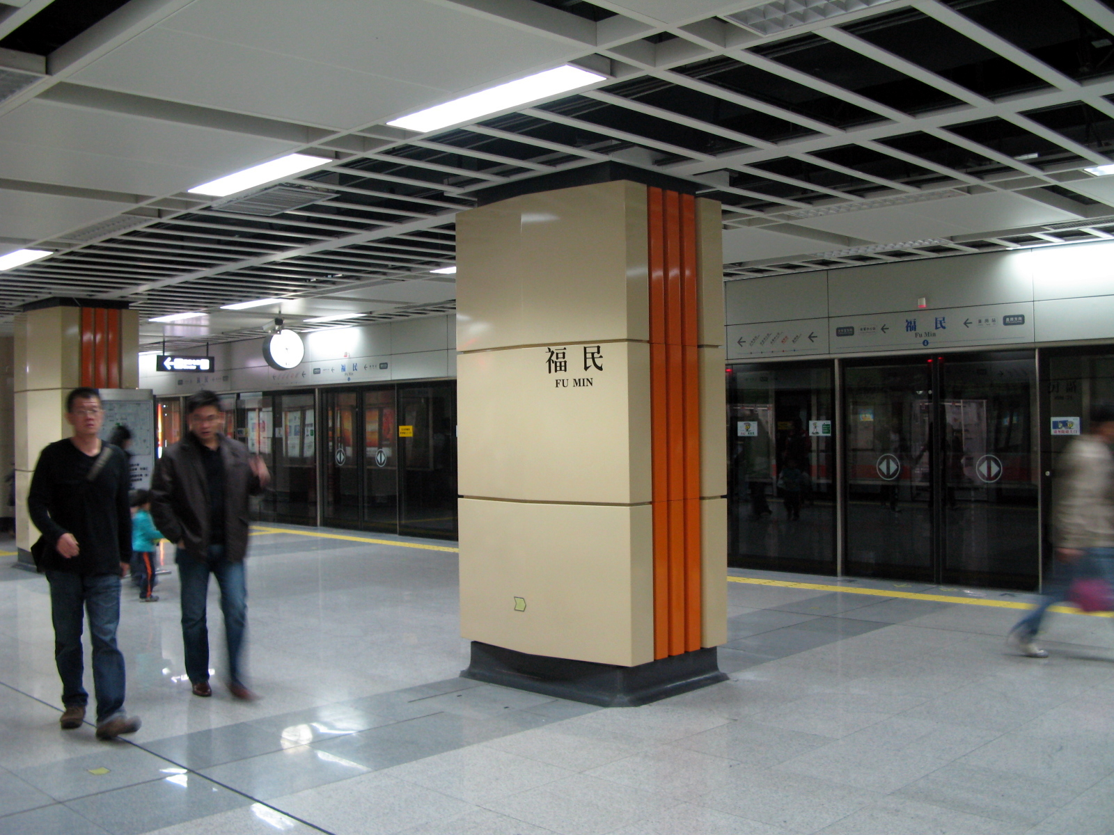 ShenZhen Metro Fu Man Station Platform